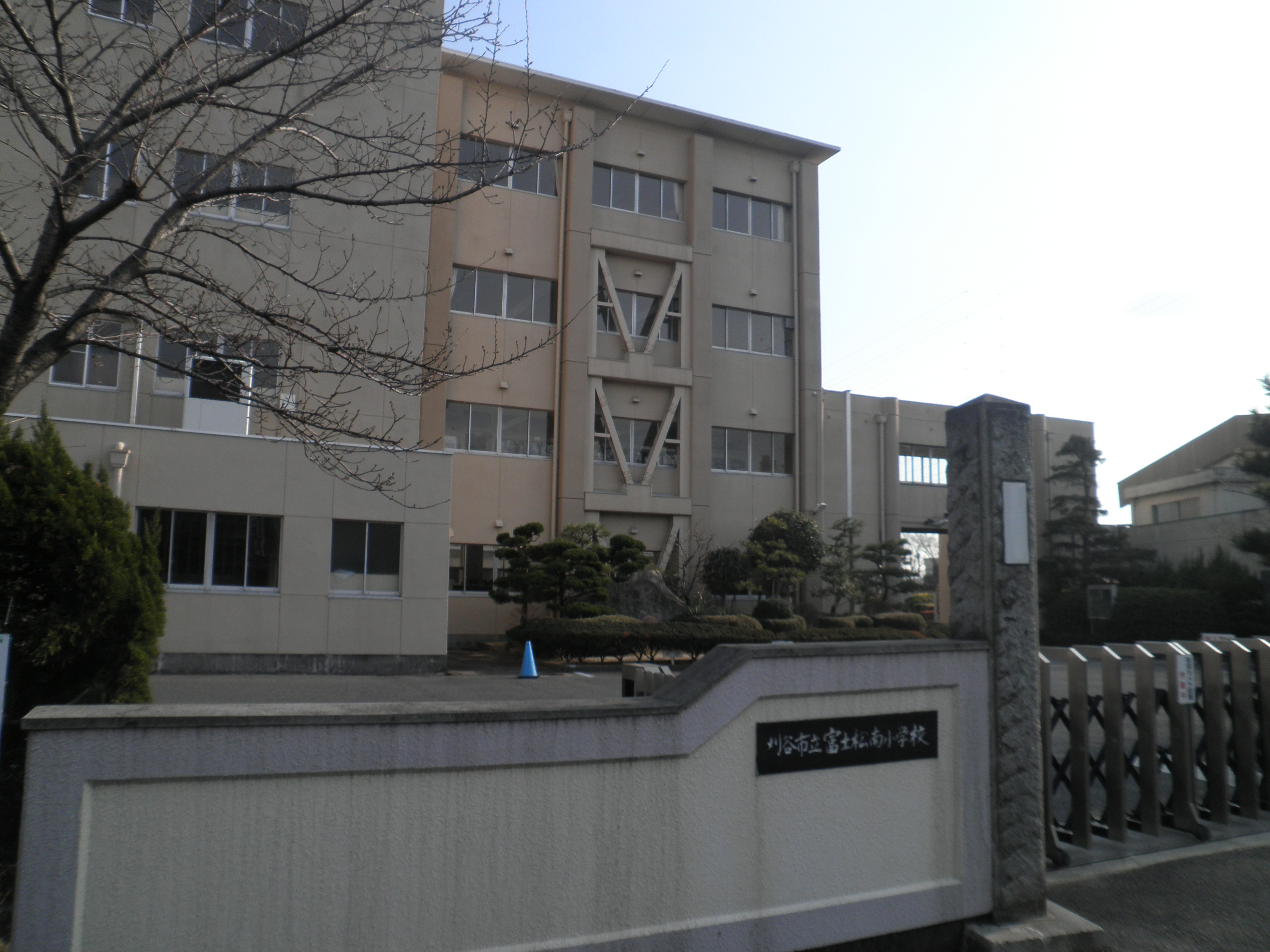 愛知県刈谷市今川町にある刈谷市立富士松南小学校